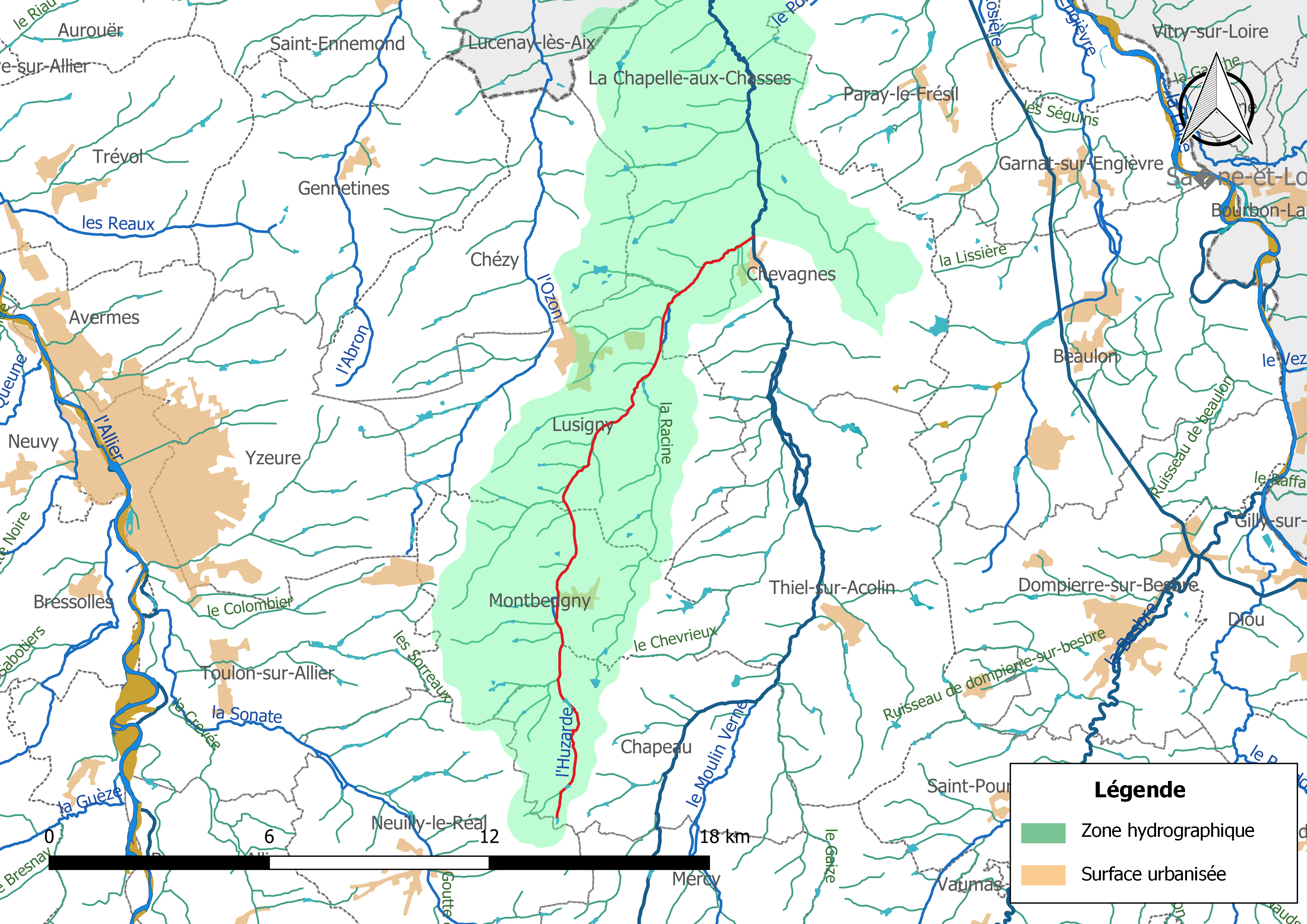 Carte du cours d'eau « l'Huzarde » (France) et de la zone hydrographique dans laquelle il s'insère.